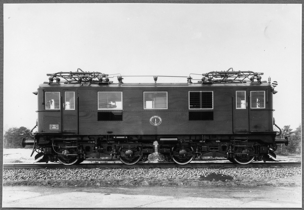 GBJ Bs 1